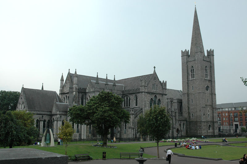 聖派屈克大教堂 聖派屈克大教堂是愛爾蘭首都都柏林境內最重要的教堂，採英國哥德式建築風格，是愛爾蘭的國家教堂與都柏林最重要觀光景點之一。 本圖片是由上傳者User:SElephant在2005年9月間拍攝。